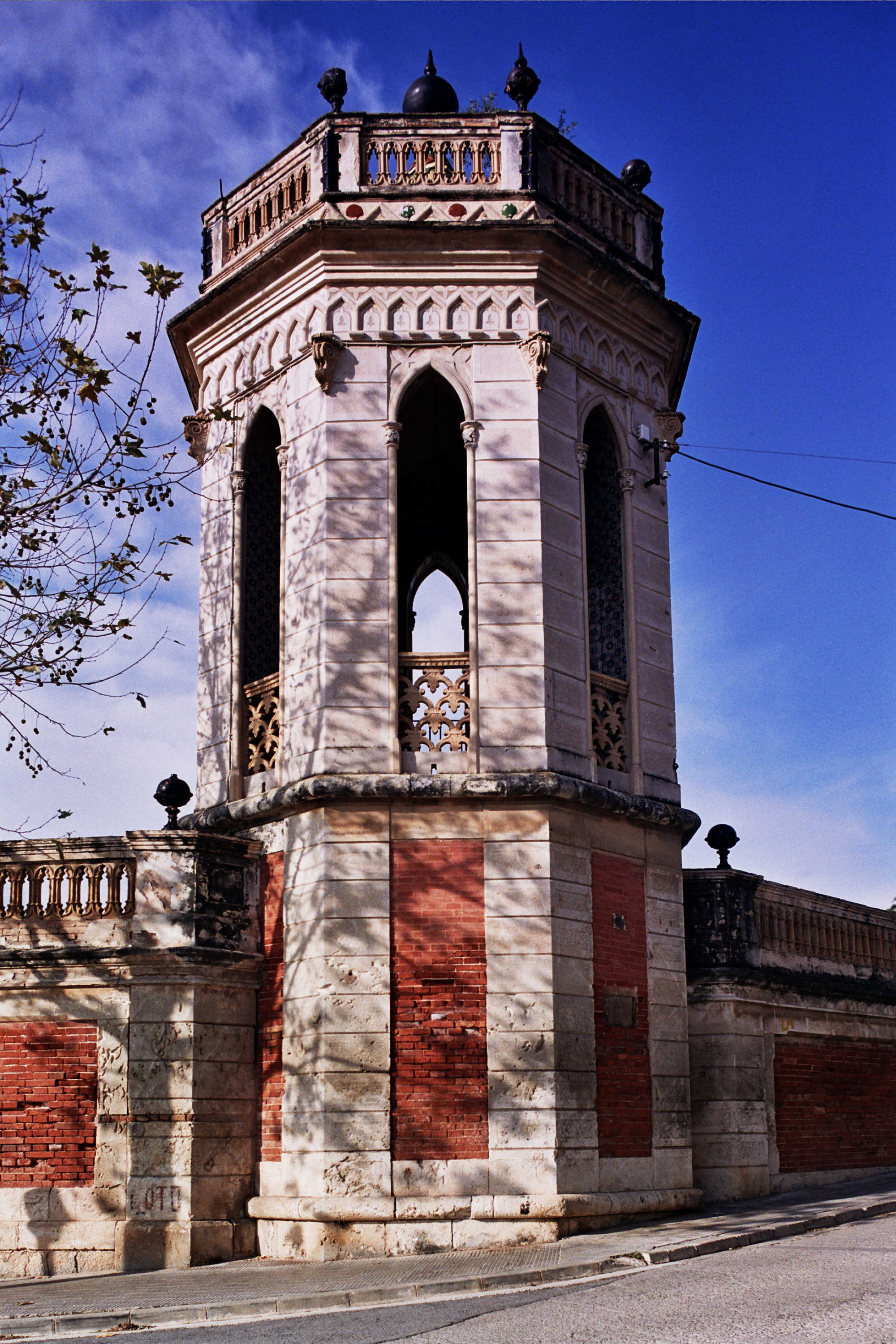 Torre del mur del Palau Gener i Batet